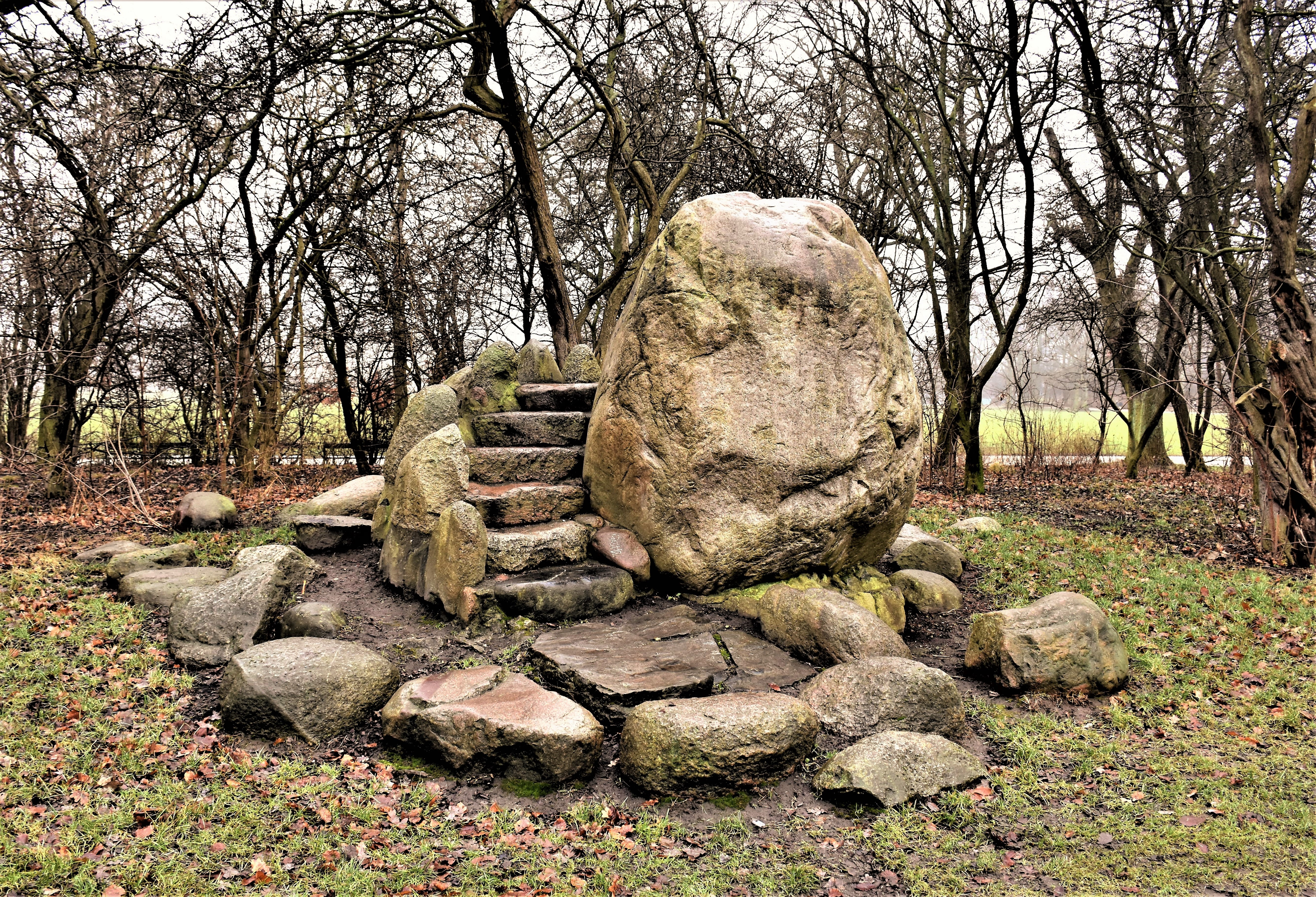 Speeker's podium in Gælledparken in Copenhagen, Denmark